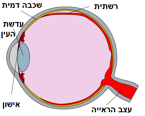 הרשתית (באדום) מנותקת בחלקה העליון של העין.